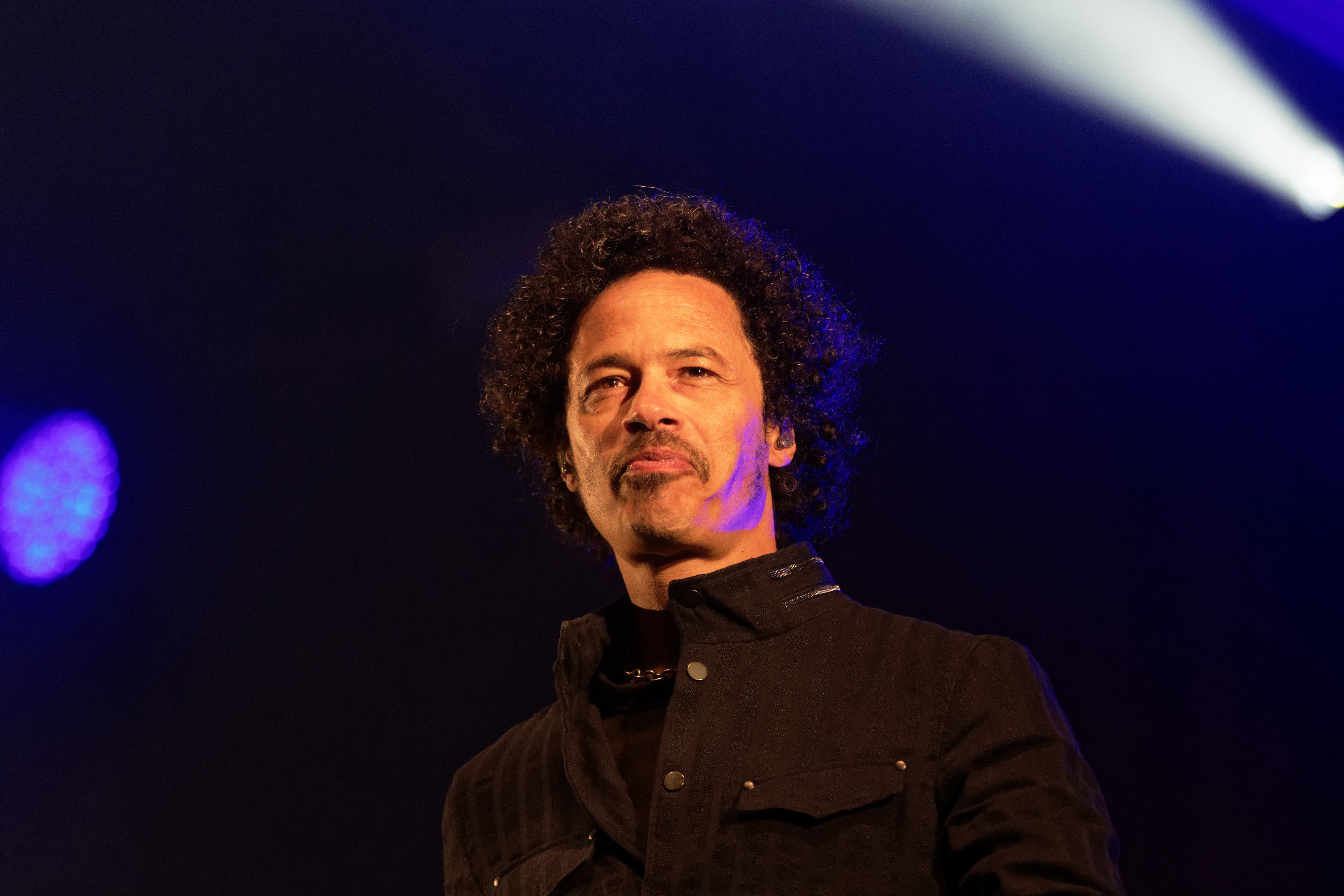 Eagle Eye Cherry en concert lors du festival du Bout du Monde 2019.